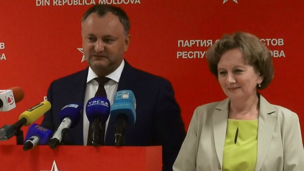 Igor Dodon & Zinaida Greacenîi